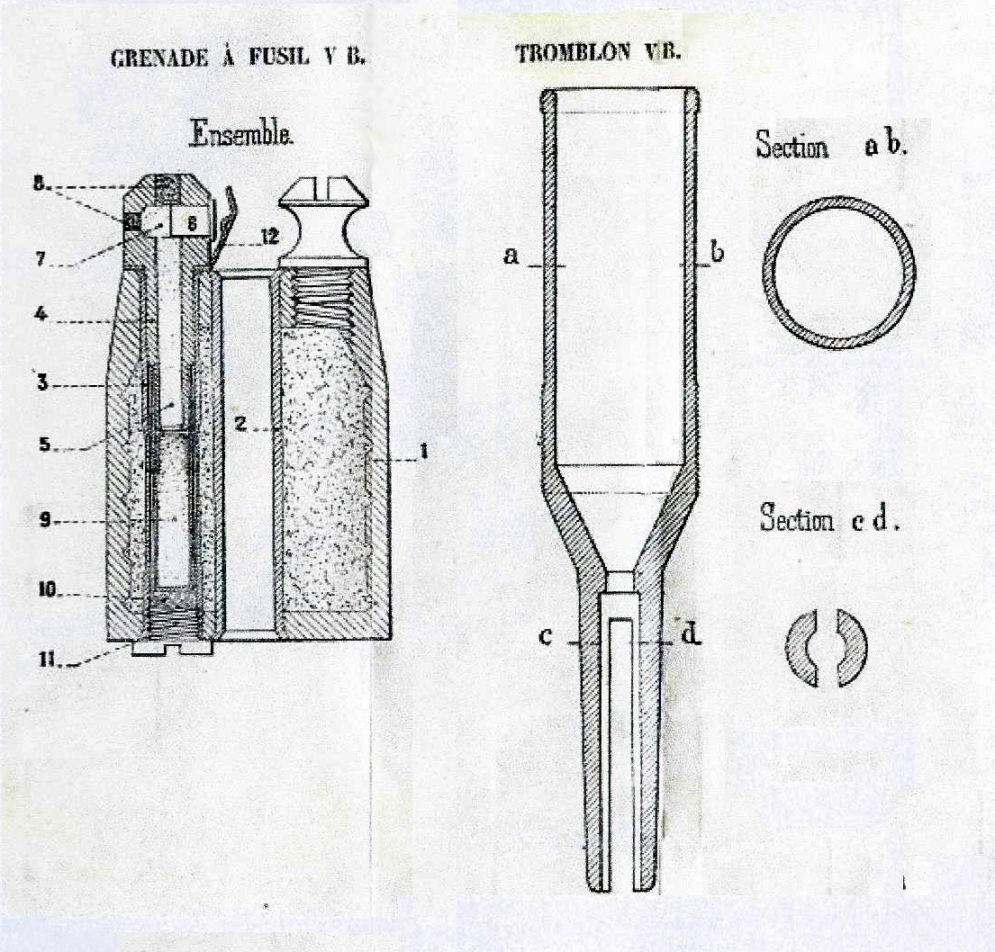 Gewehr Granate VB